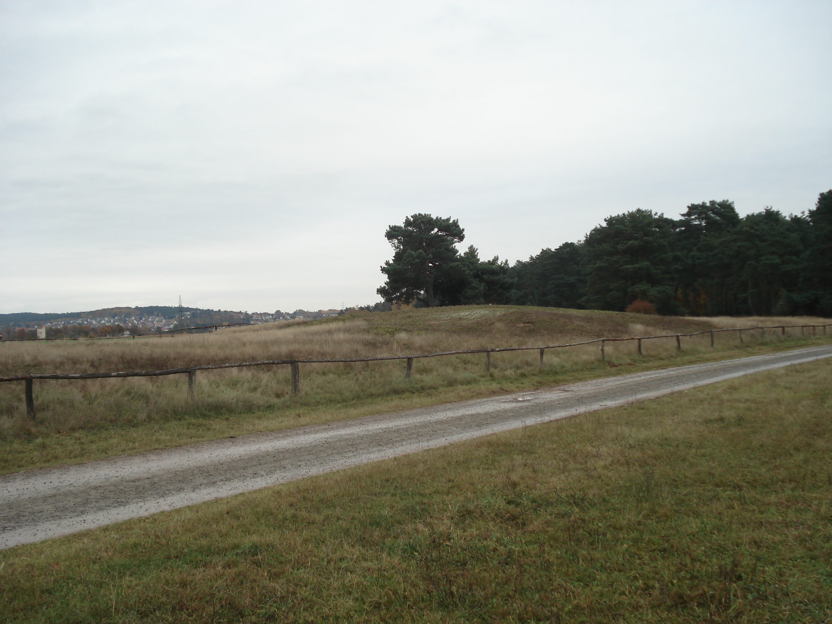 Die Haide im Naturschutzgebiet Alzenauer Sande im Oberprischoß